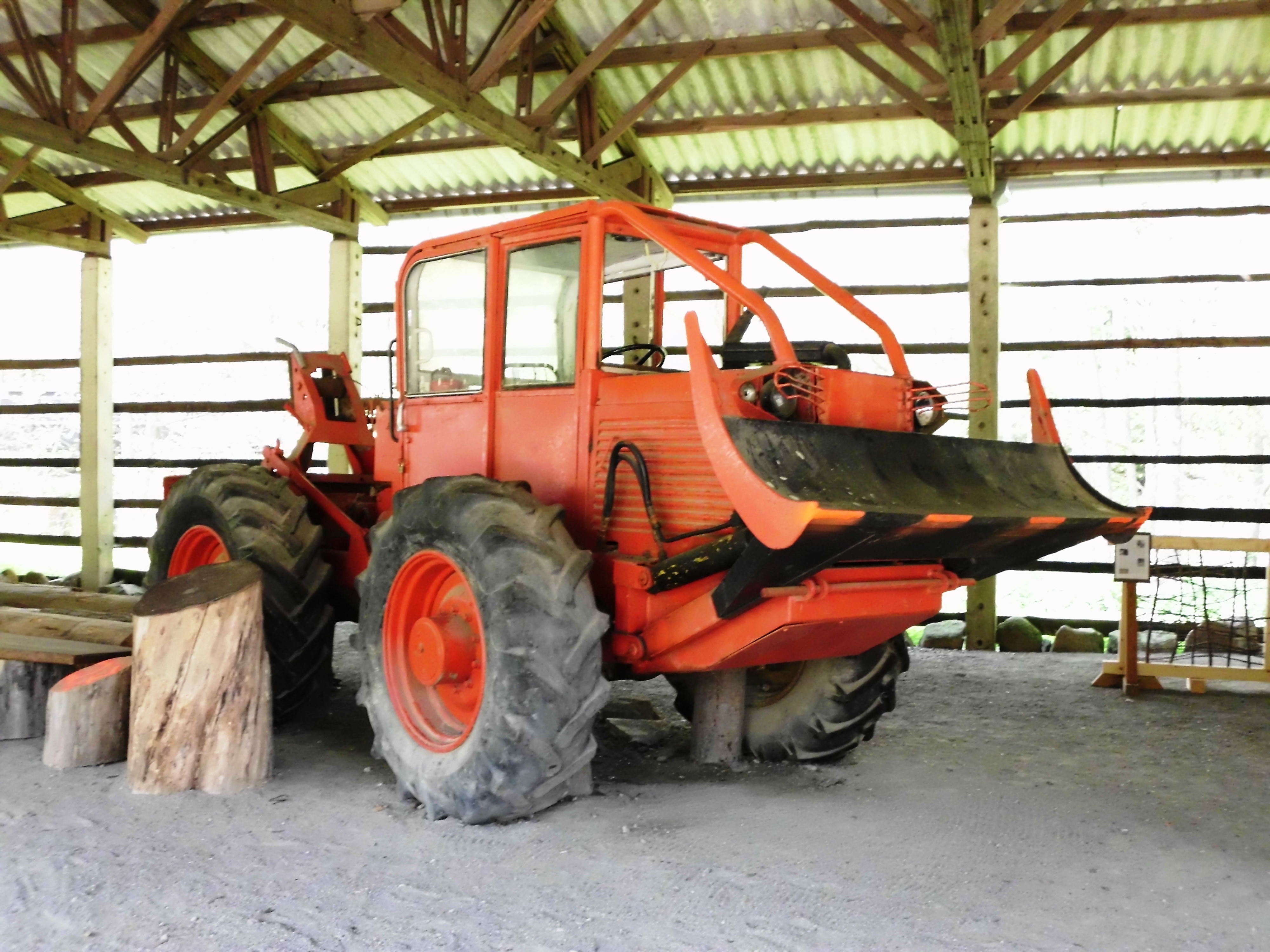 Ein tschechoslowakischer LKT-80-Forstschlepper mit Knicklenkung, Seilwinde und Polterschild auf dem Waldhof Silberhütte, Stadt Harzgerode